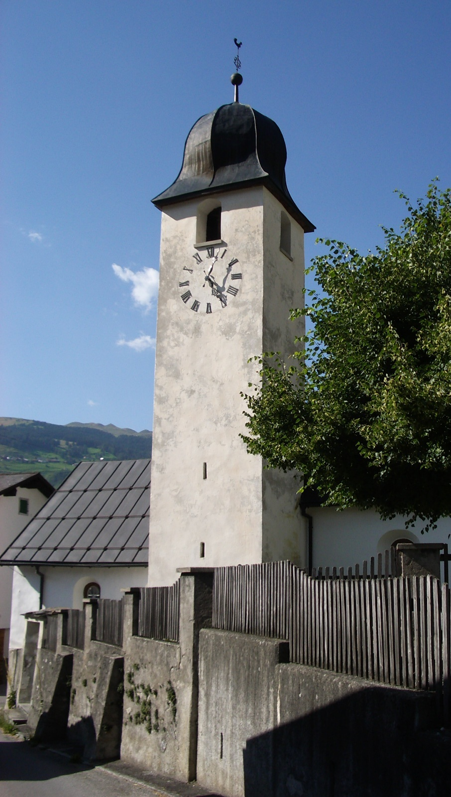 Pignia GR, Switzerland